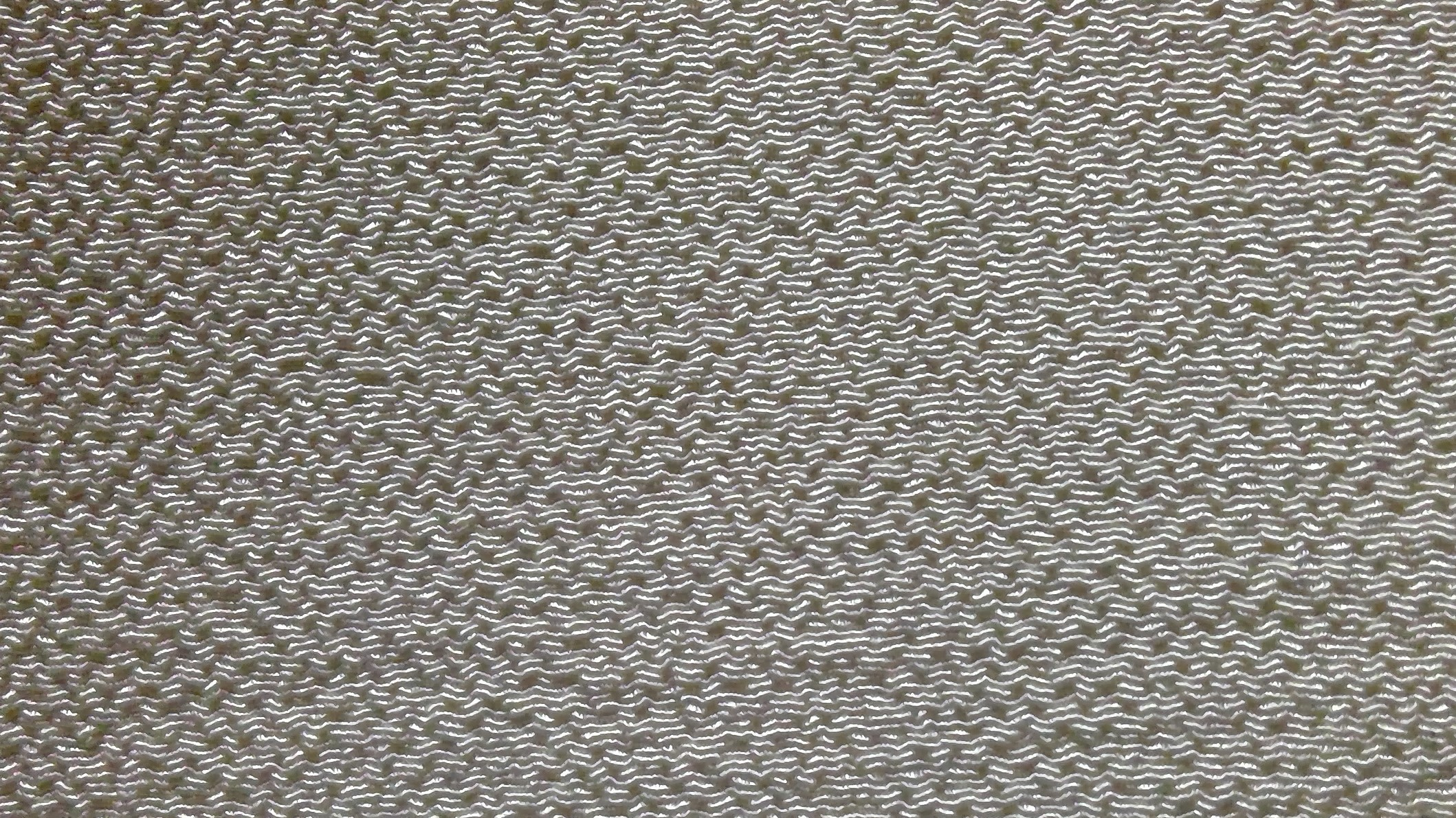 丹後ちりめんの１種で、古代の白生地に似ていることから「古代ちりめん」と呼ばれる。別名「二越ちりめん」「鬼シボちりめん」